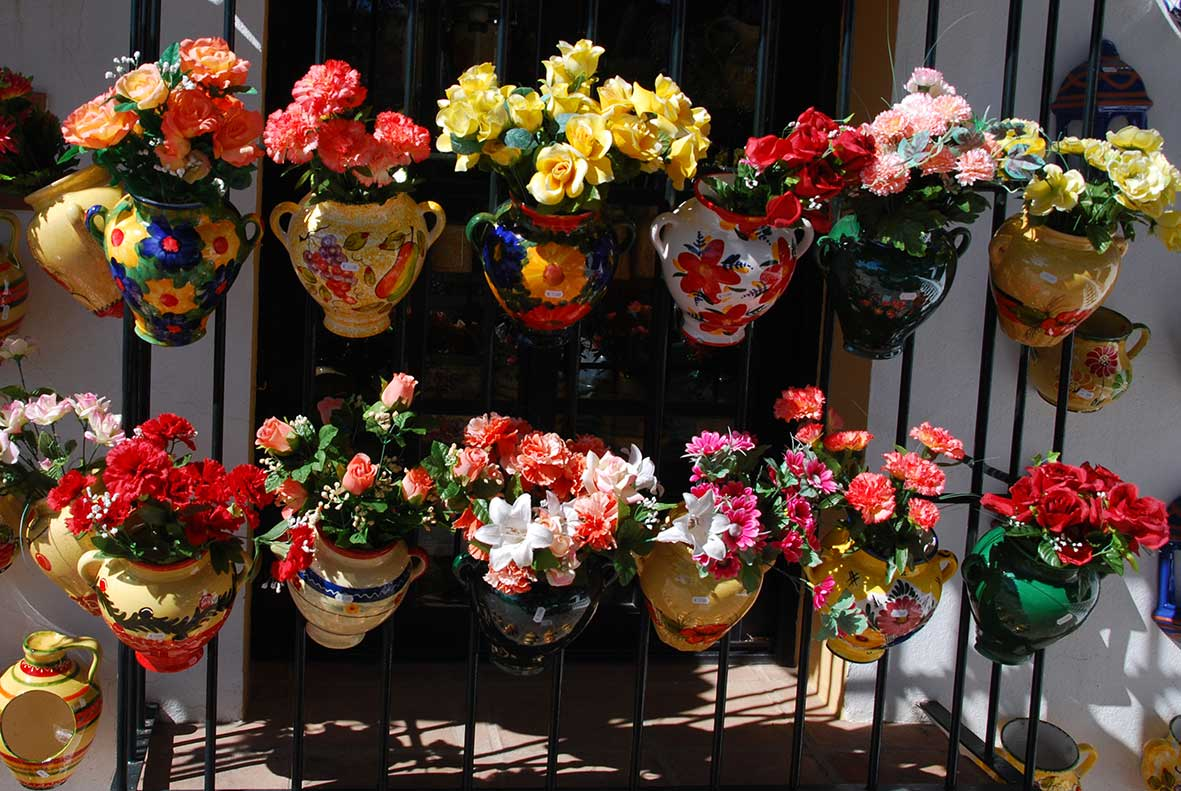 Mijas